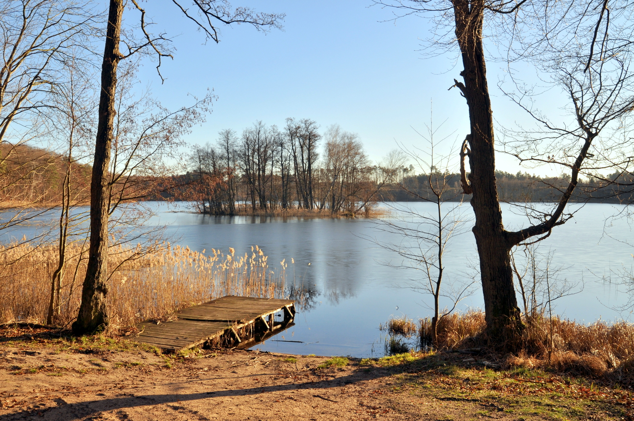 Jezioro Sitno Moczydelskie, na terenie Barlinecko-Gorzowskiego Parku Krajobrazowego. Na foto. wyspa na jeziorze.